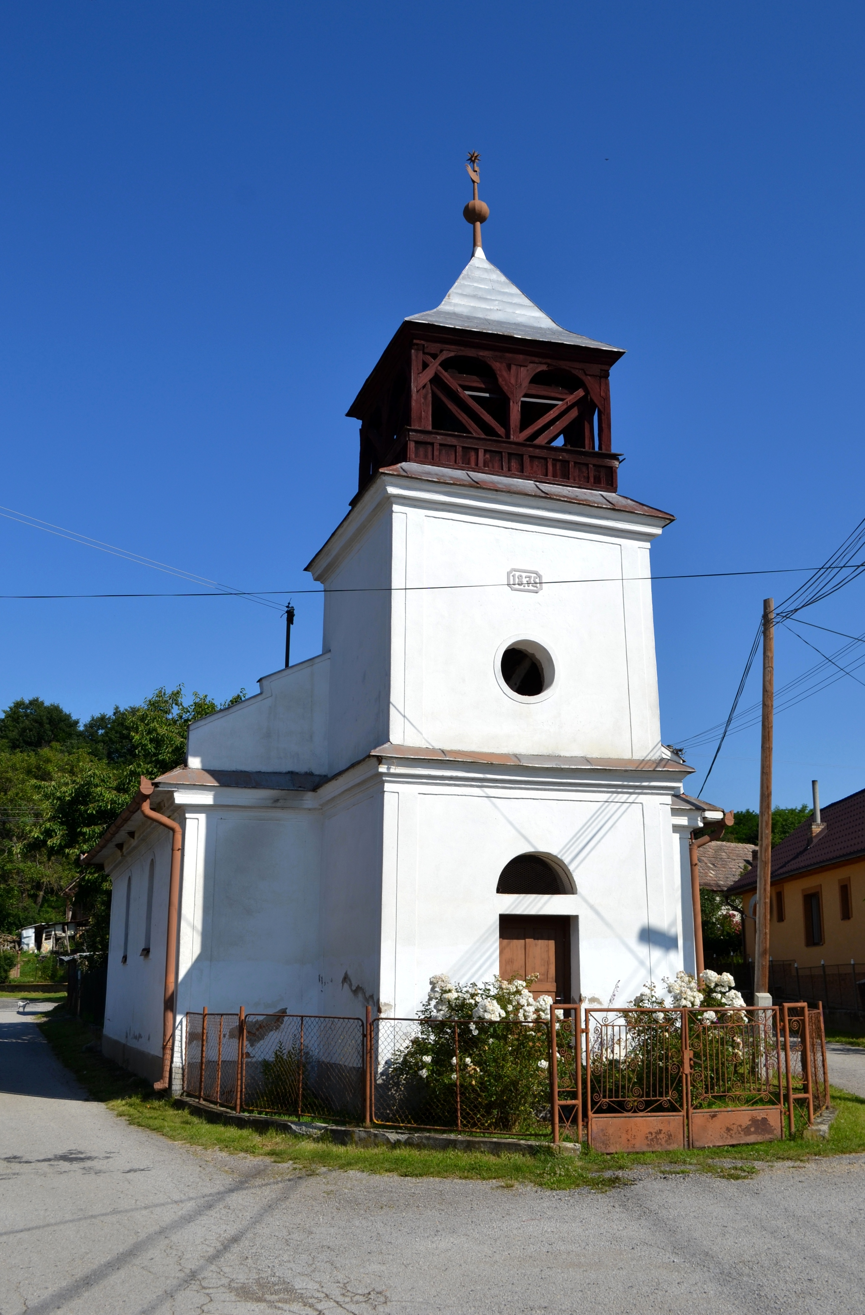 Reformovaný kostol v Chvalovej